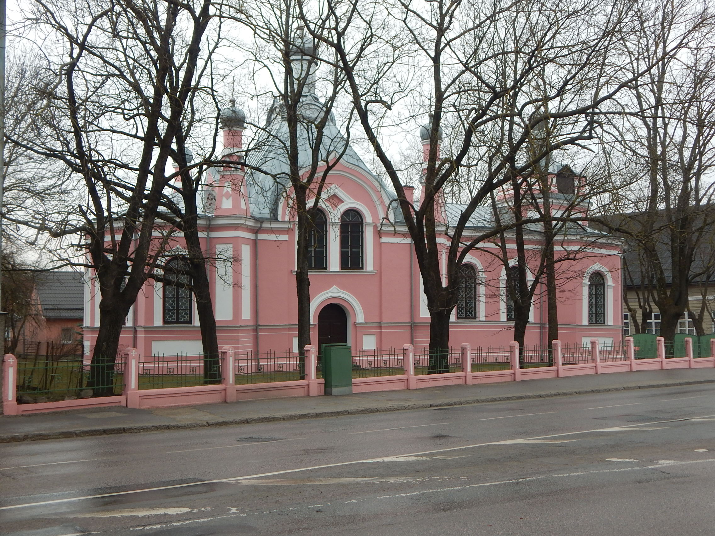 Cerkiew św. Jerzego w Tartu